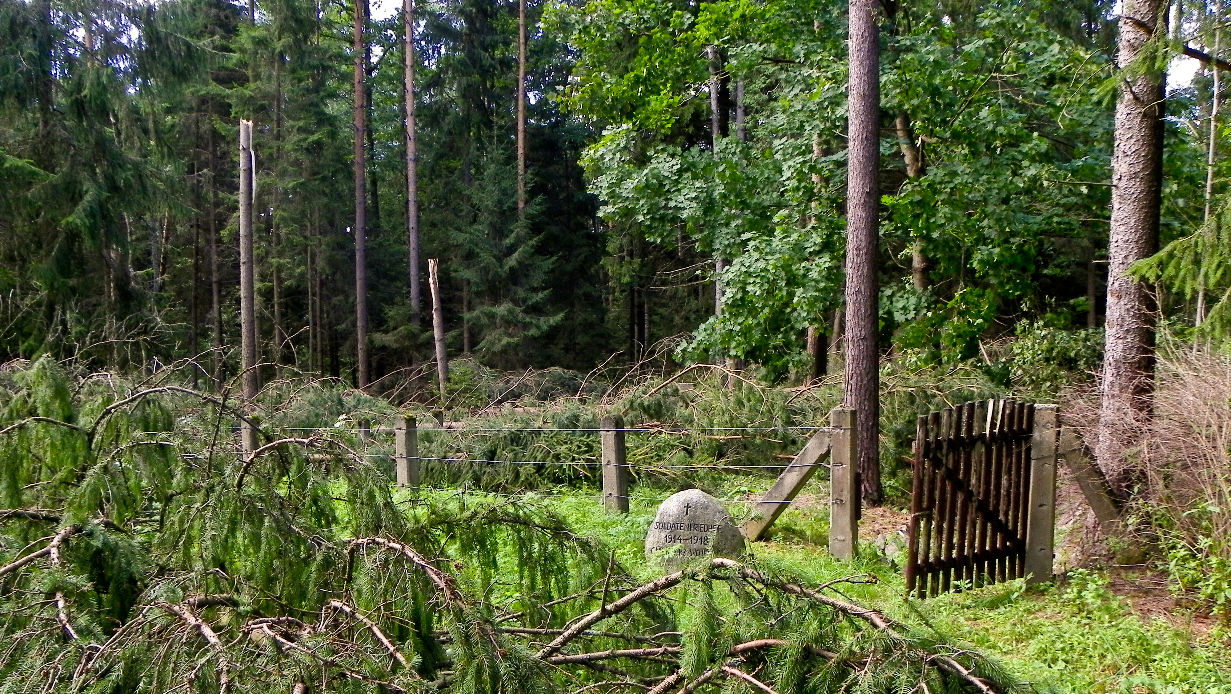 Cmentarz wojenny w Grądzkich Ełckich. Kilka dni przed wykonaniem zdjęcia przez miejscowość przeszła silna nawałnica, która zwaliła wiele drzew.